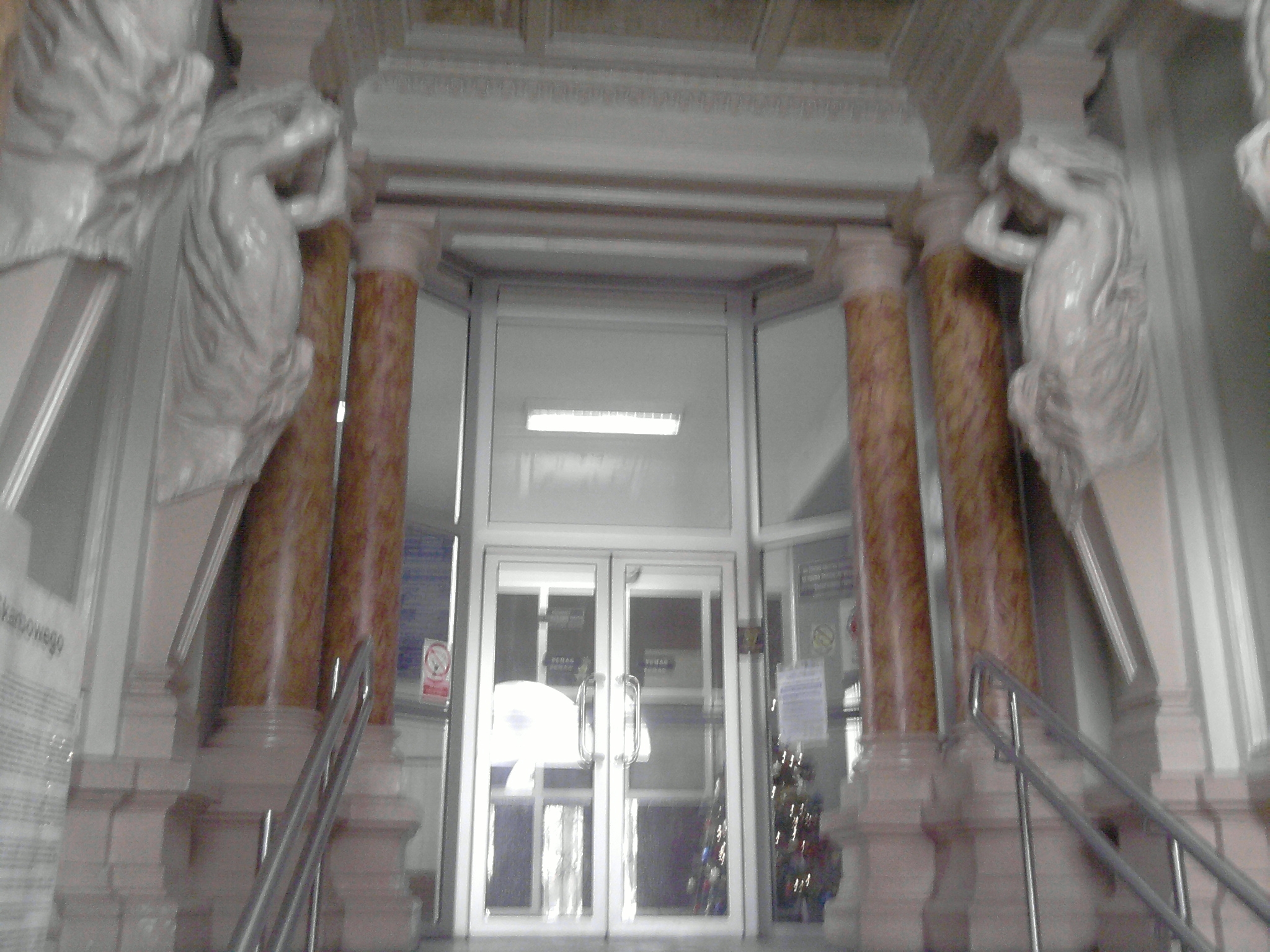 Urząd Skarbowy w Raciborzu